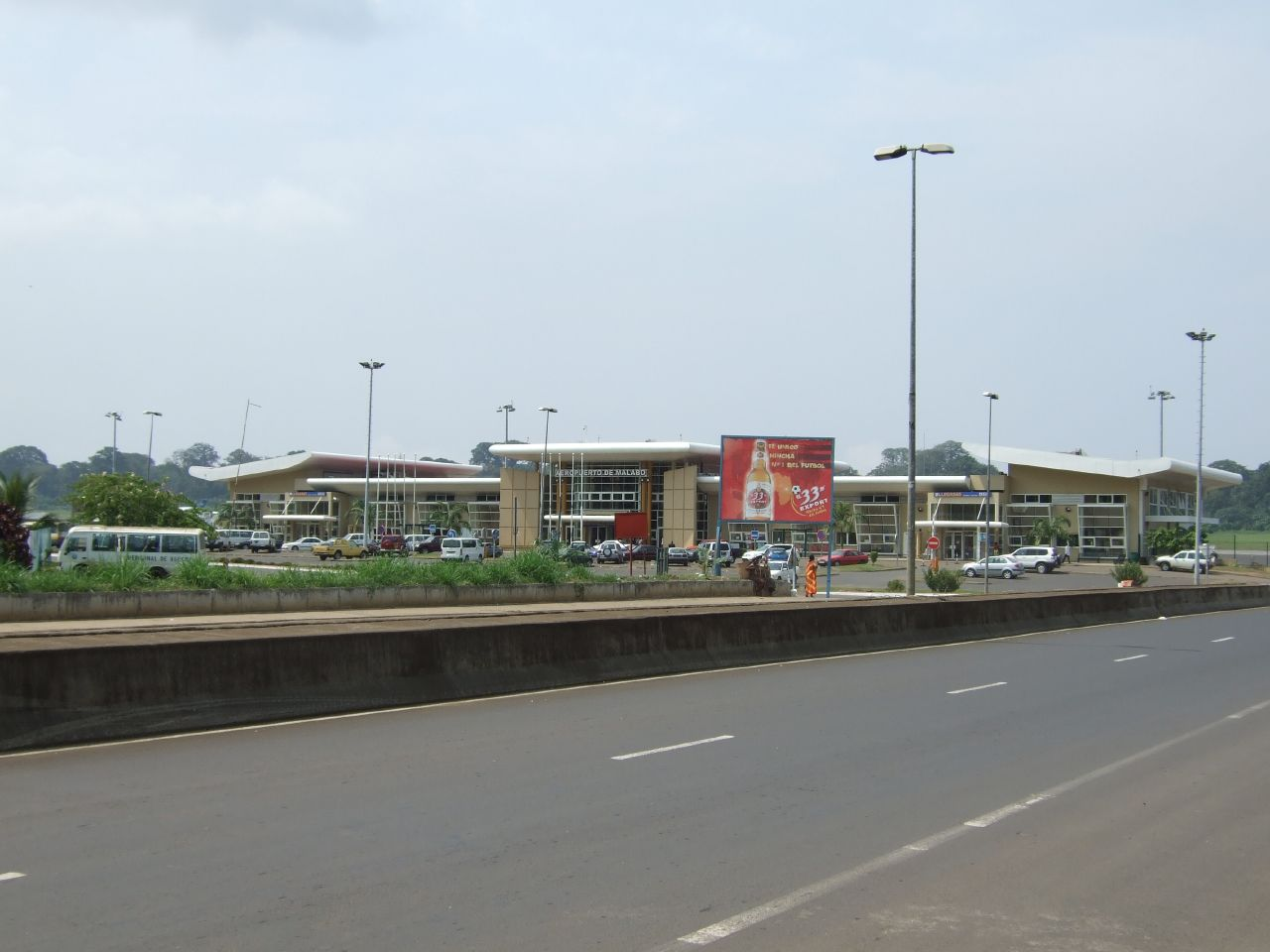 ftografias del aeropuerto de malabo, bioko norte, guinea ecuatorial